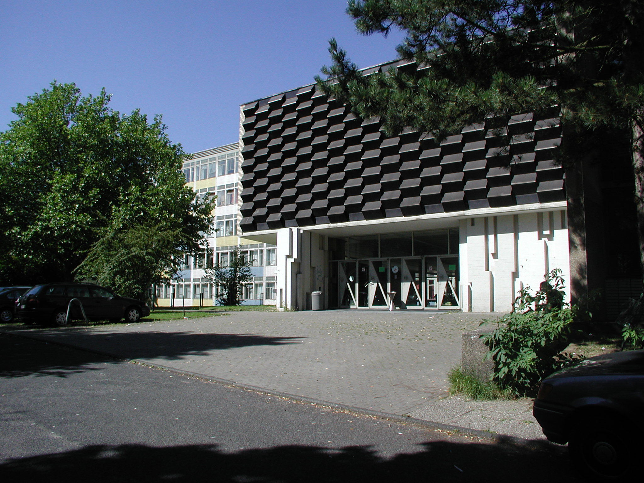 Alice-Salomon-Berufskolleg von außen.